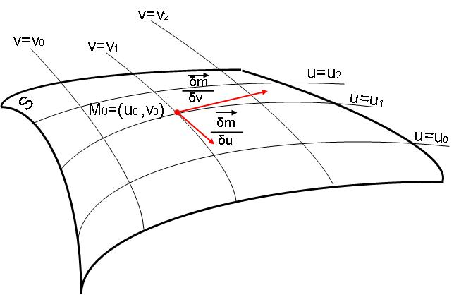 Courbes coordonnées d'une surface